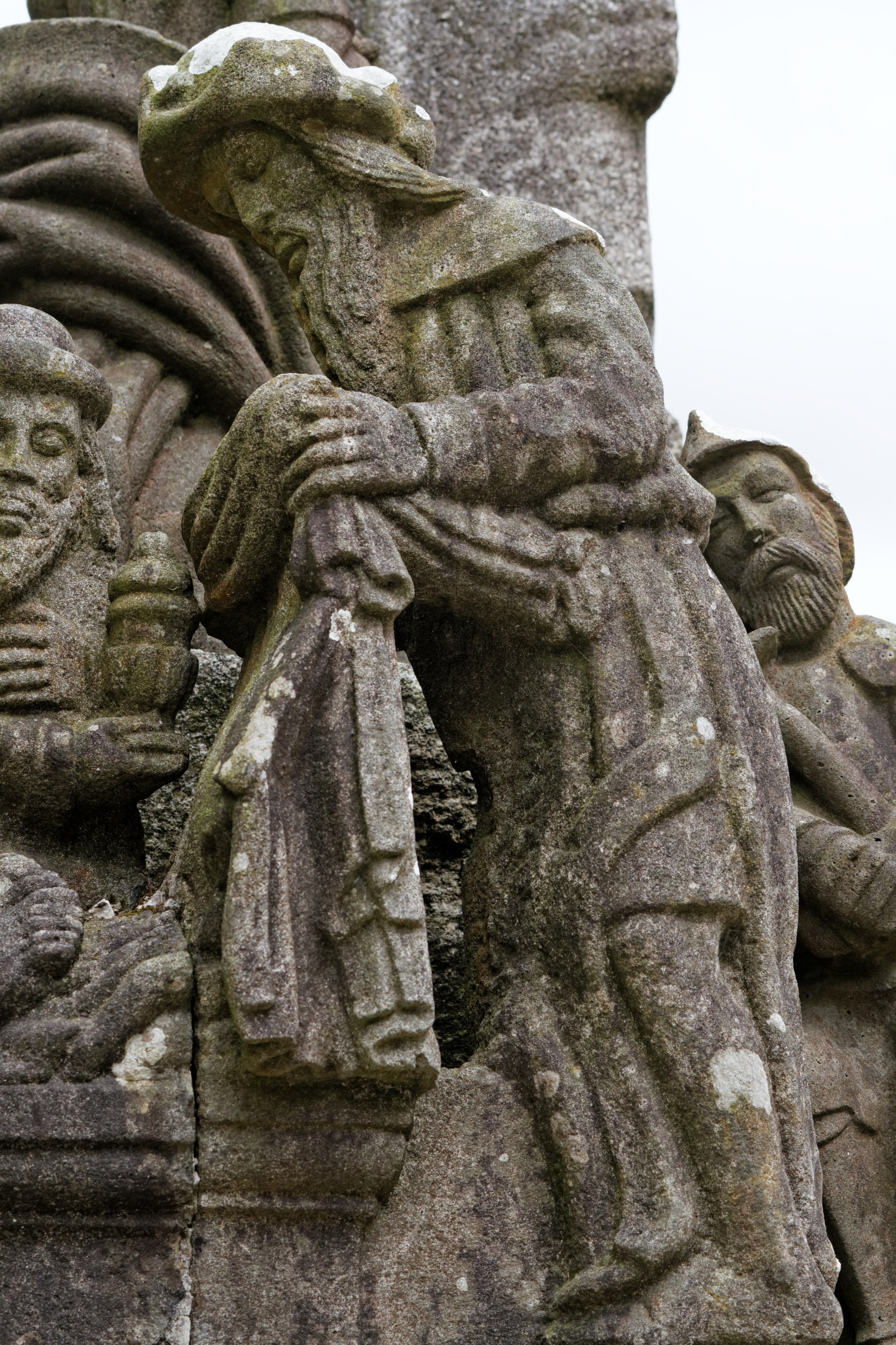 L'enclos paroissial de Saint Thegonnec dans le Finistère.